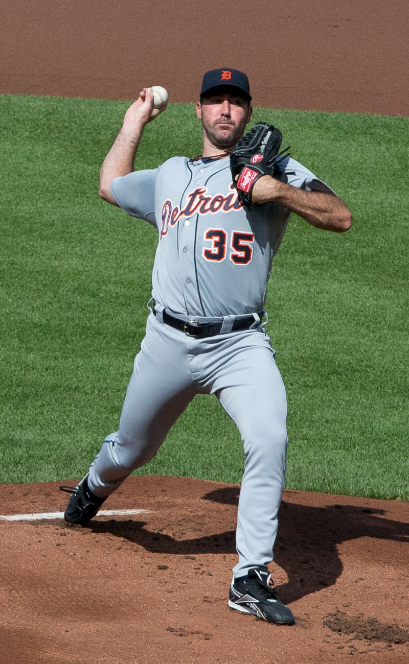 Justin Verlander